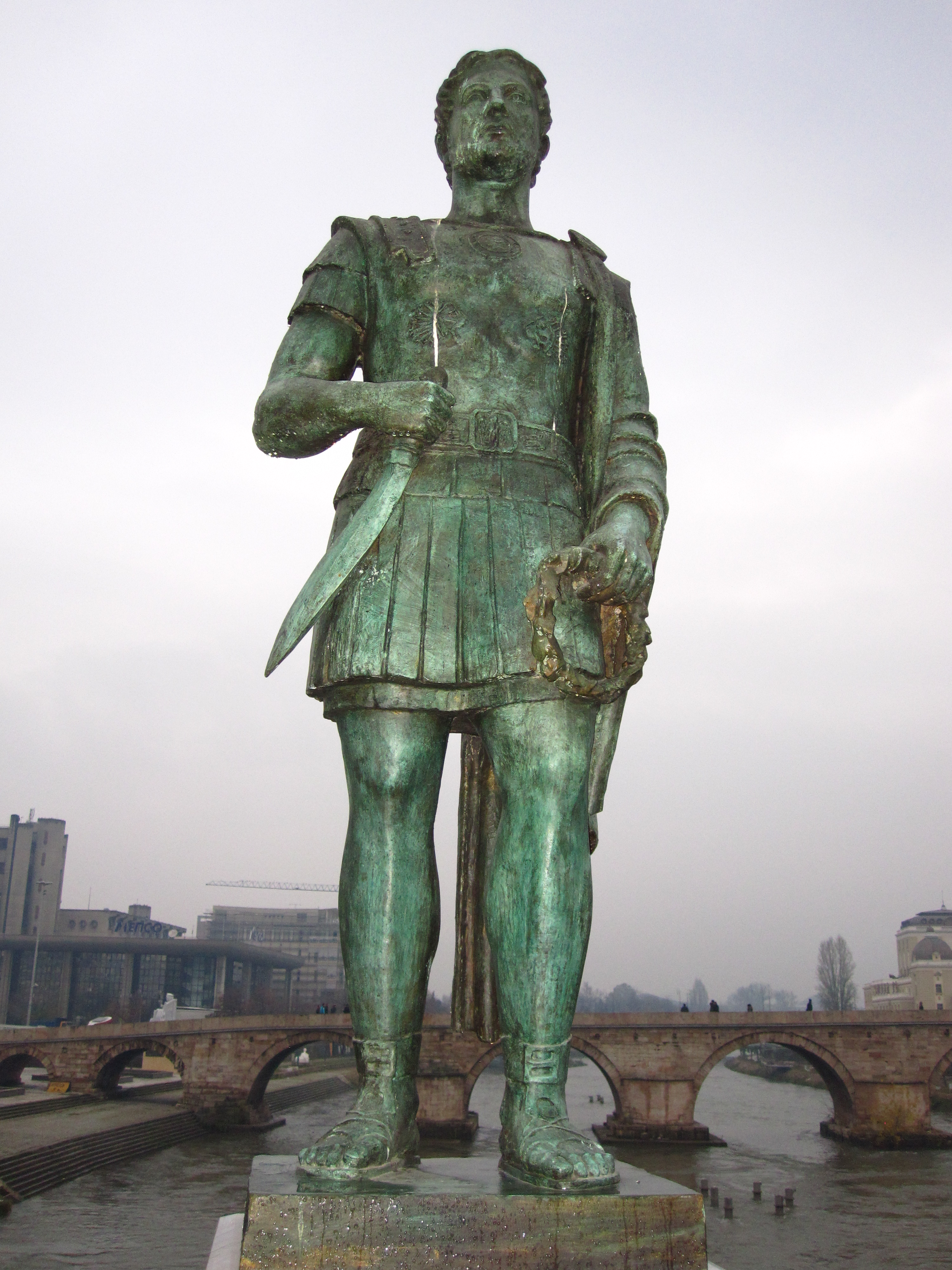 Споменик - Персеј во Скопје.